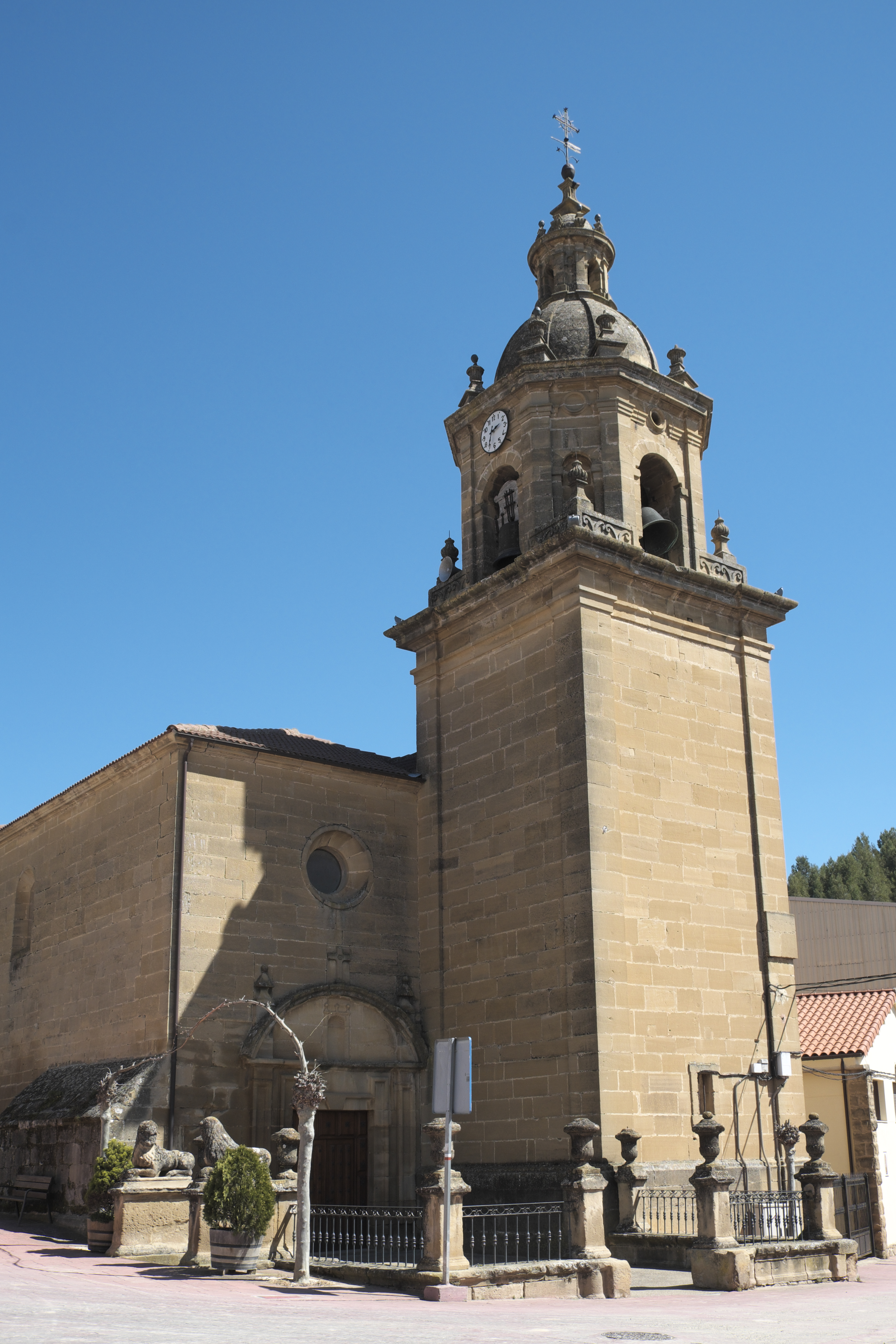 Katholische Pfarrkirche Nuestra Señora de la Antigua in Baños de Ebro in der Provinz Álava in der Autonomen Gemeinschaft Baskenland (Spanien)